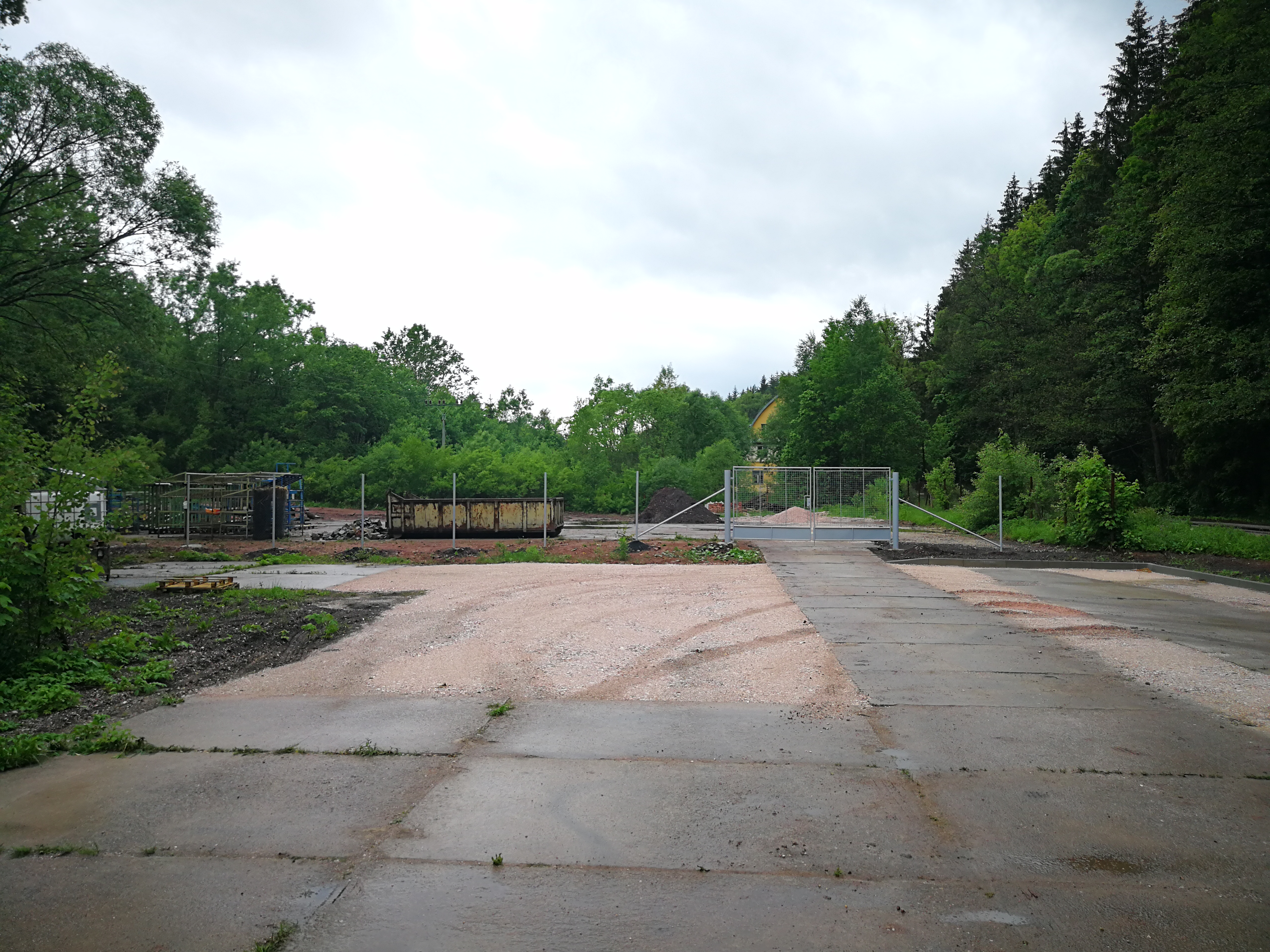 Vodní nádrž Fořt Project: Fotíme Česko.